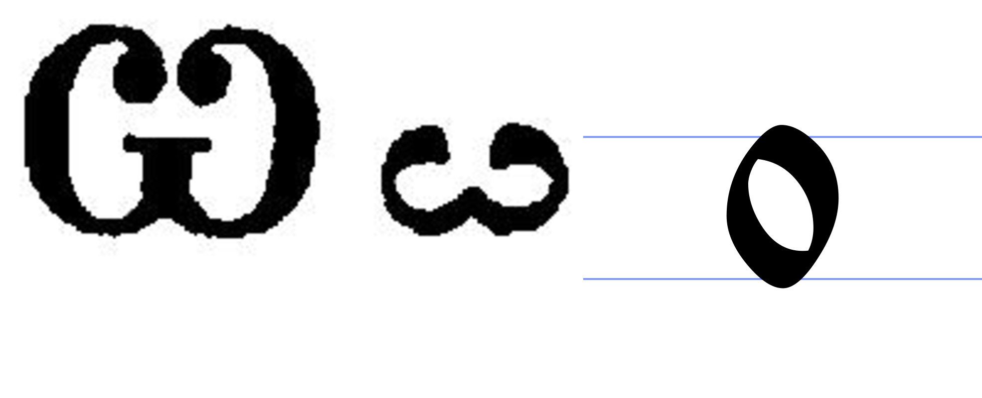 Буква Омега и О на основе кириллицы в церковнославянском языке